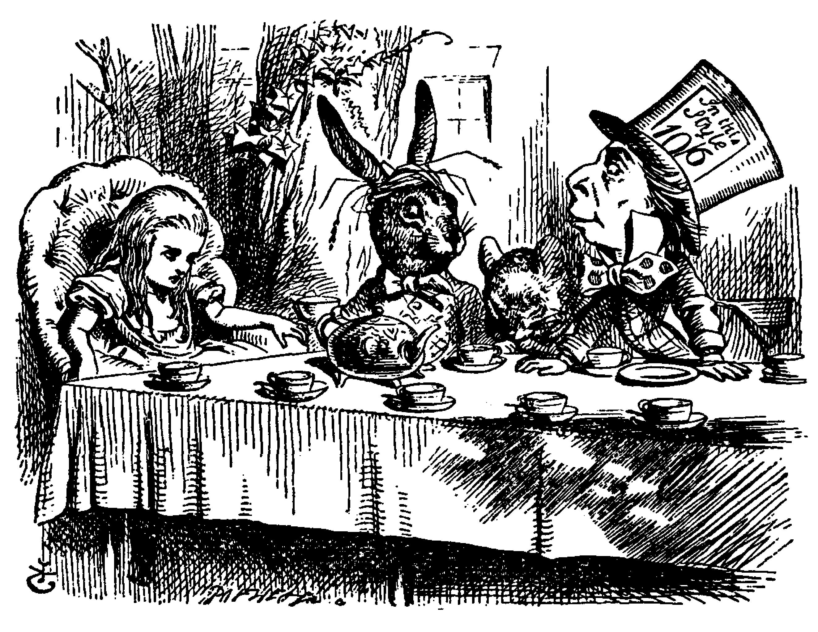 Alice’s Abenteuer im Wunderland Übersetzer: Antonie Zimmermann Orginal Titel: Alice's Adventures in Wonderland Illustrationen: John Tenniel